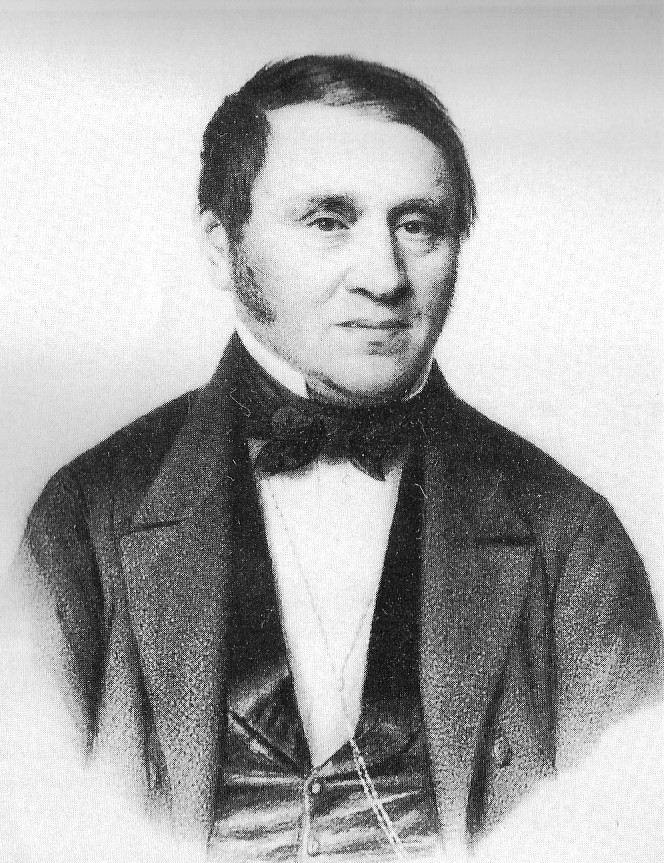 Forretningsmagnat Thor Thommesen, født 6. februar 1797 i Stange, død 30. november 1862 i Arendal